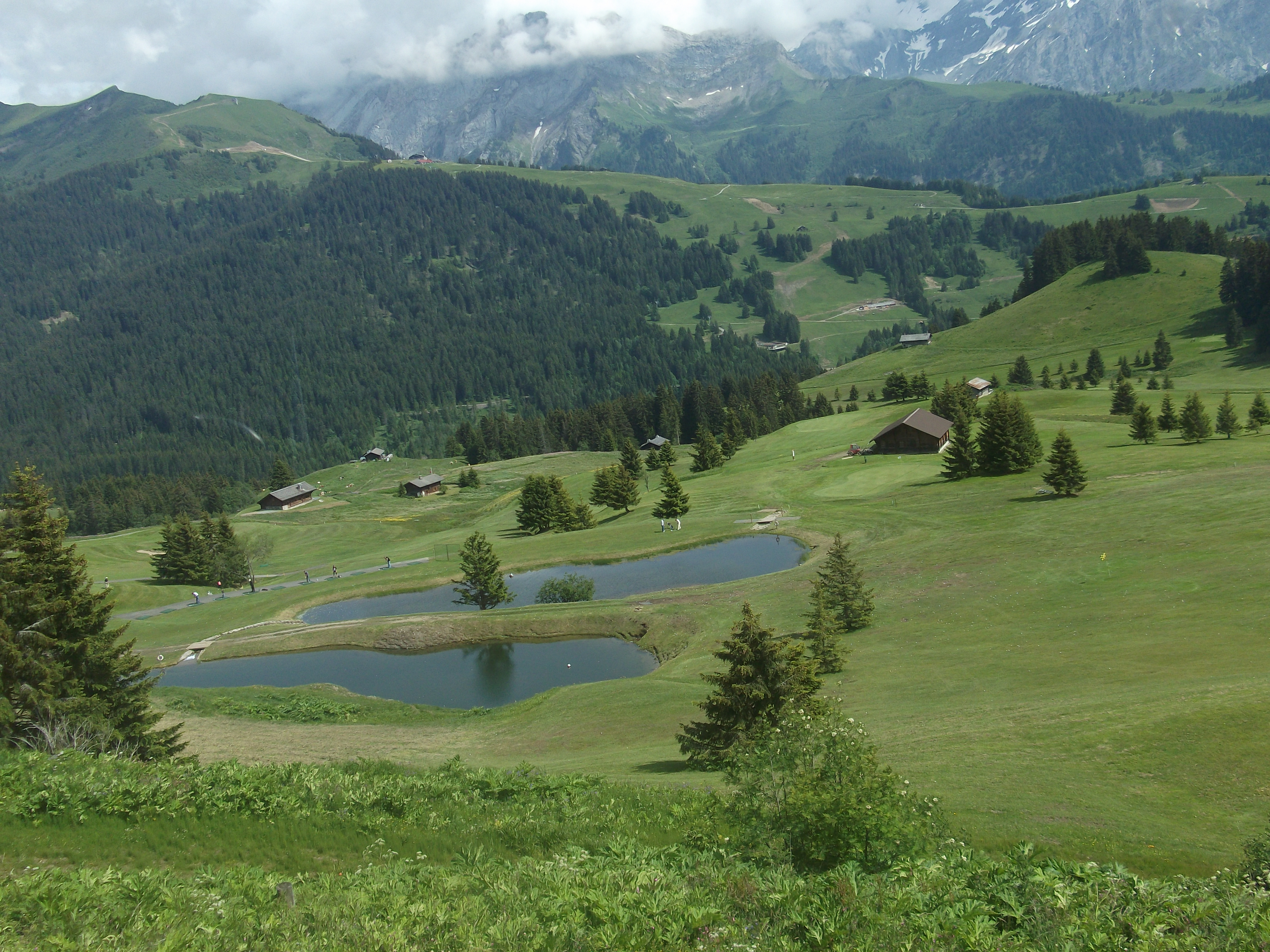 מגרש הגולף בוילאר-סור-אולון